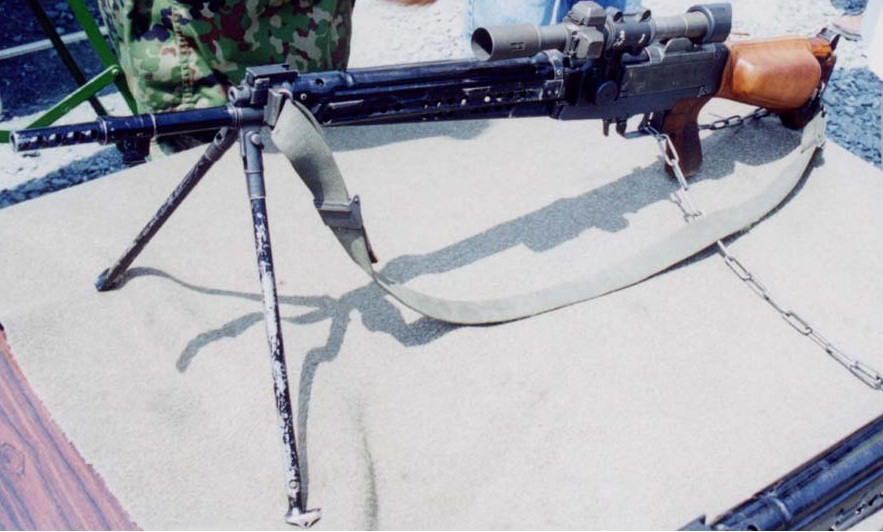 創立記念時に撮影、当時のネガをスキャンして作成。